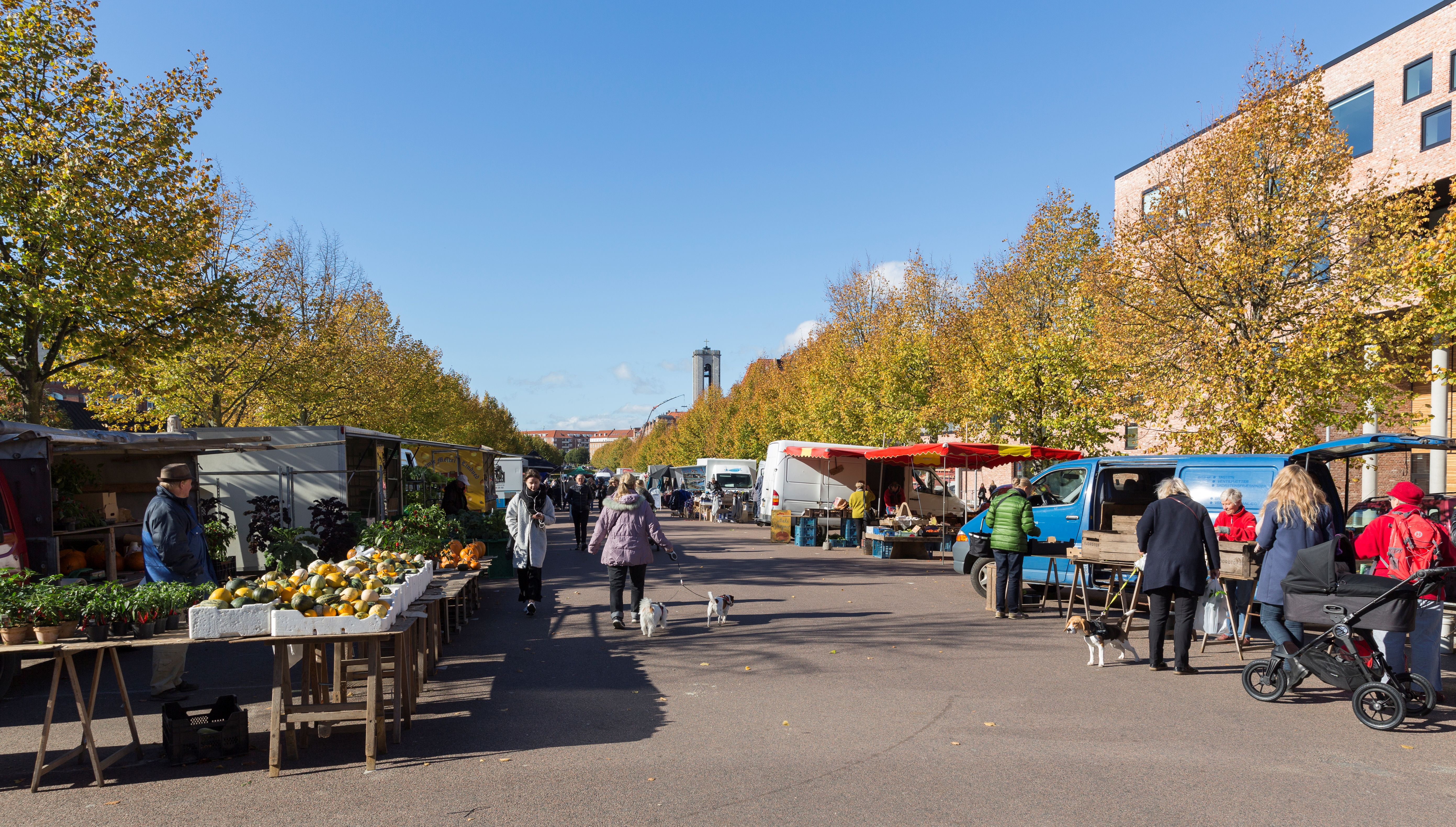 Torvedag på Ingerslev Boulevard